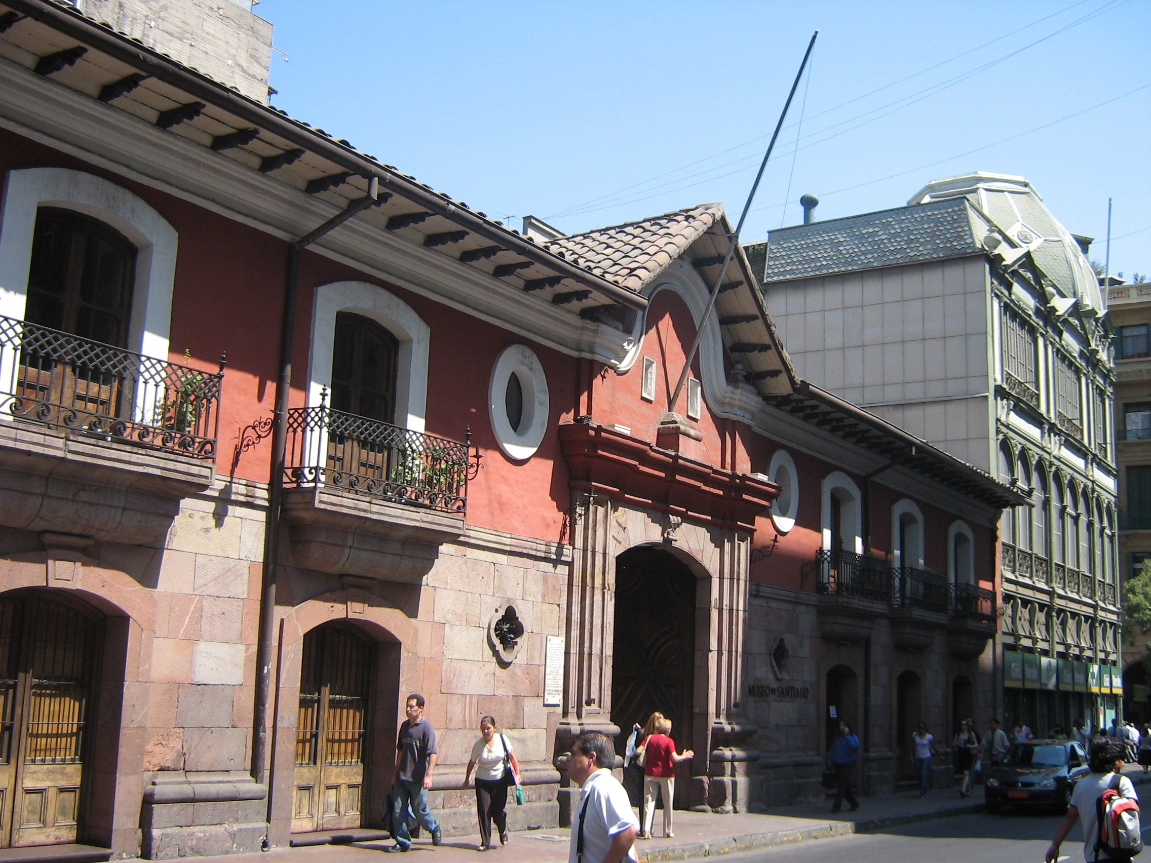 Casa Colorada, Santiago Museum. Chile